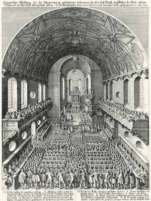 Stich zur Eröffnung der Dreieinigkeitskirche Regensburg, 1631